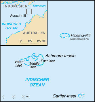 Karte Ashmore CIA World Factbook